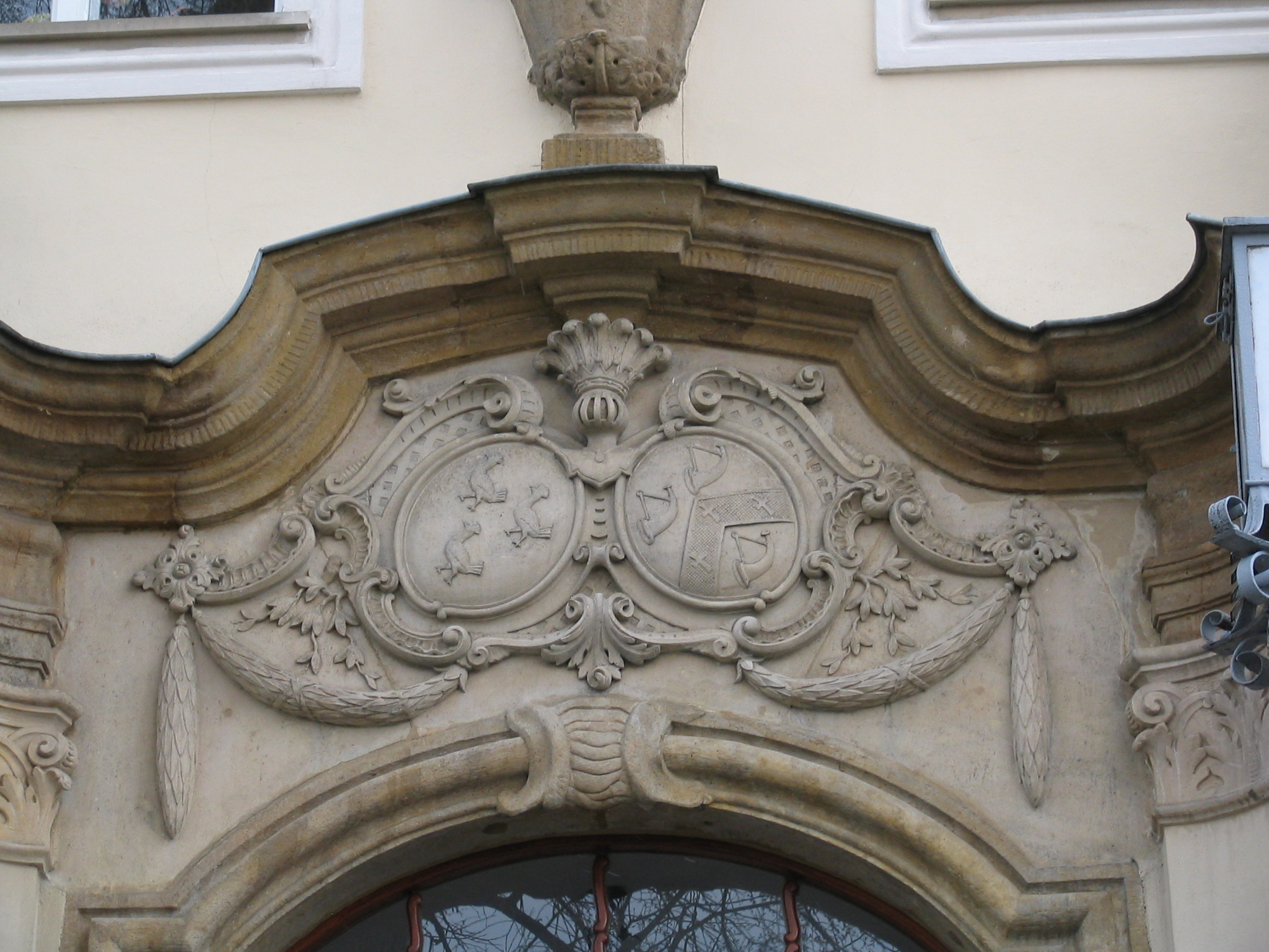 Das Allianzwappen der Familien Burt und Moltke (links) über dem Portal des Schlosses in Kreisau, Polen